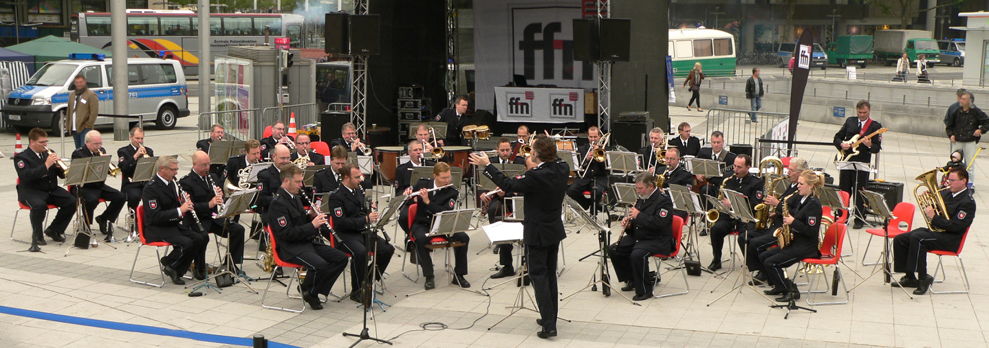 Polizeimusikkorps_Niedersachsen, Fotoaufnahme bei Veranstaltung "Polizei erleben" am 04./05.09.10 in Hannover auf dem Ernst-August-Platz